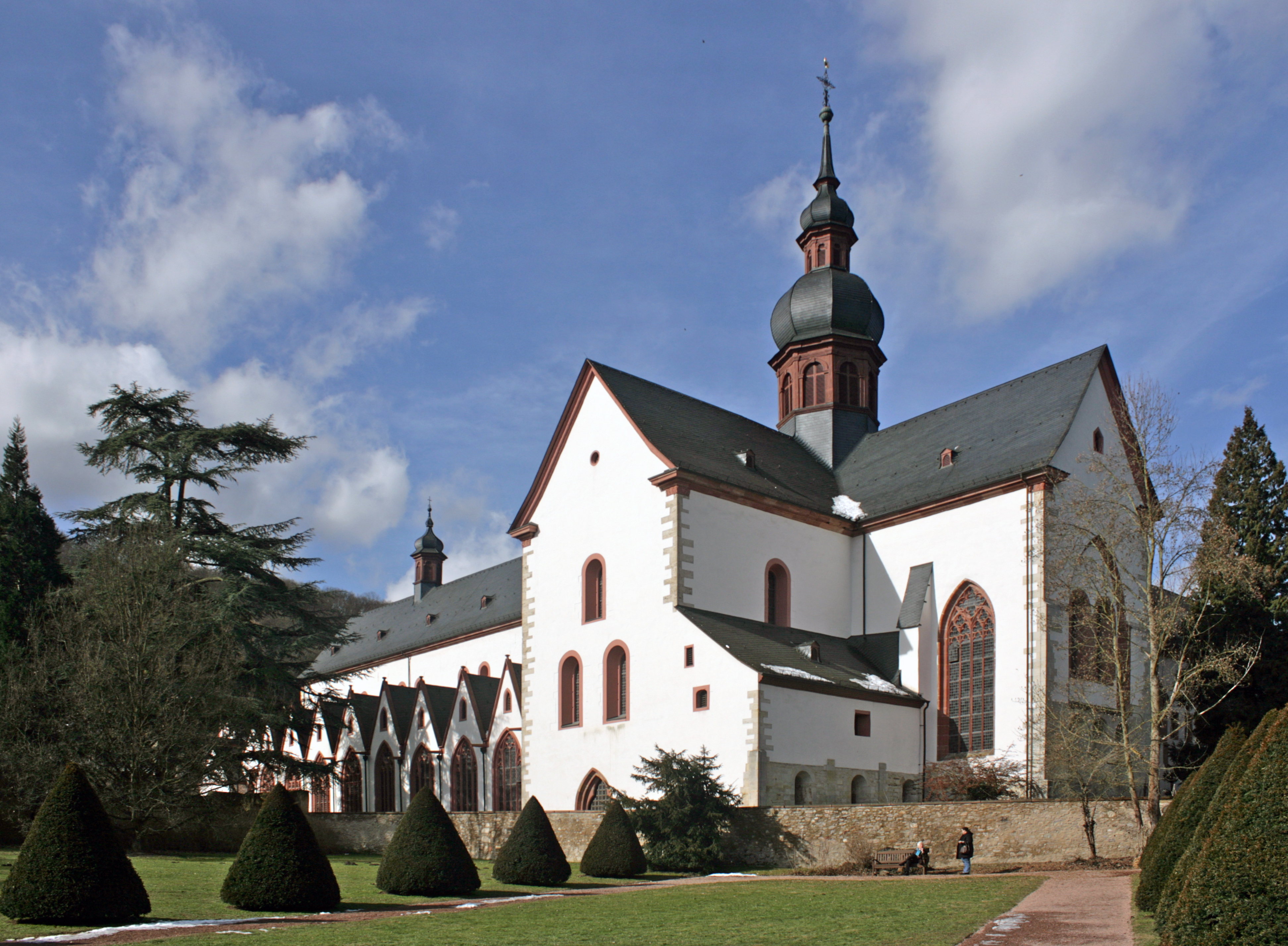 Eberbach Monastery